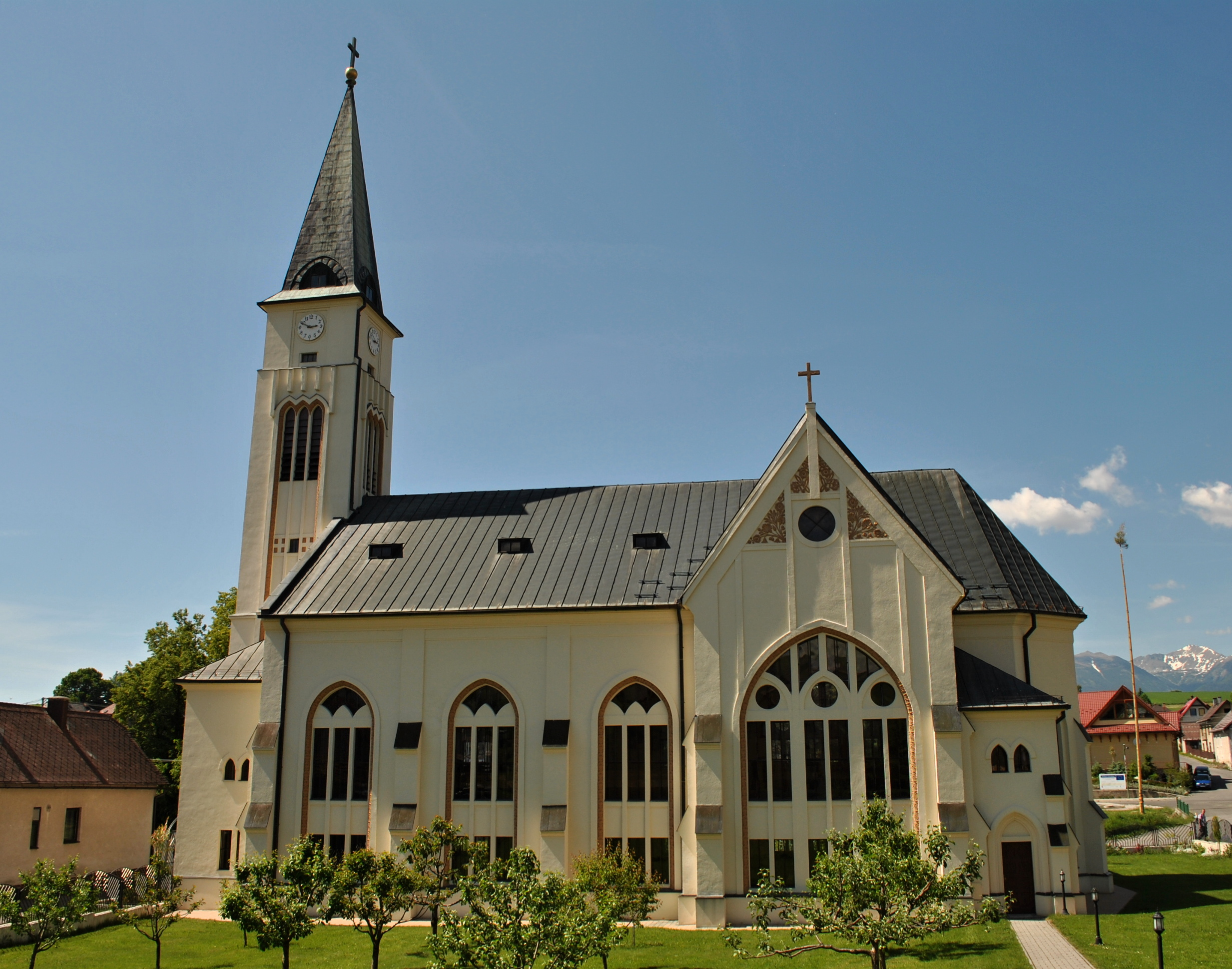 Kostol evanjelický